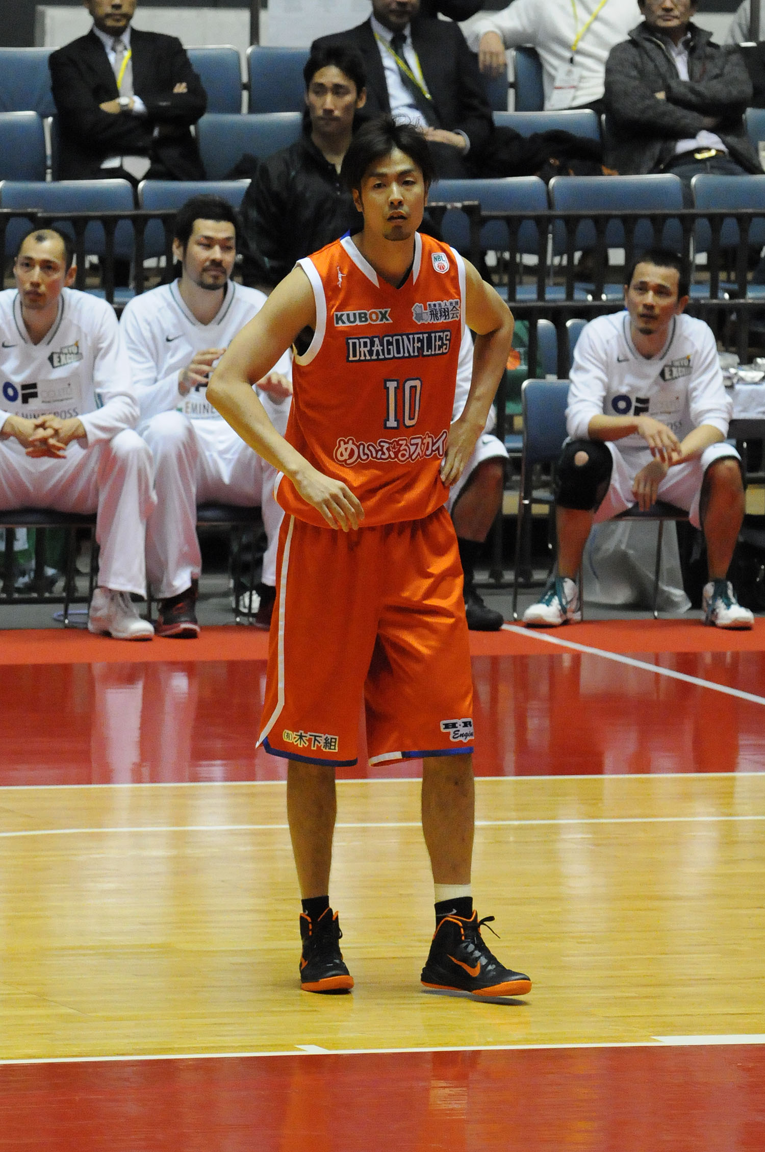 広島ドラゴンフライズ、竹内公輔選手。代々木第一体育館で。